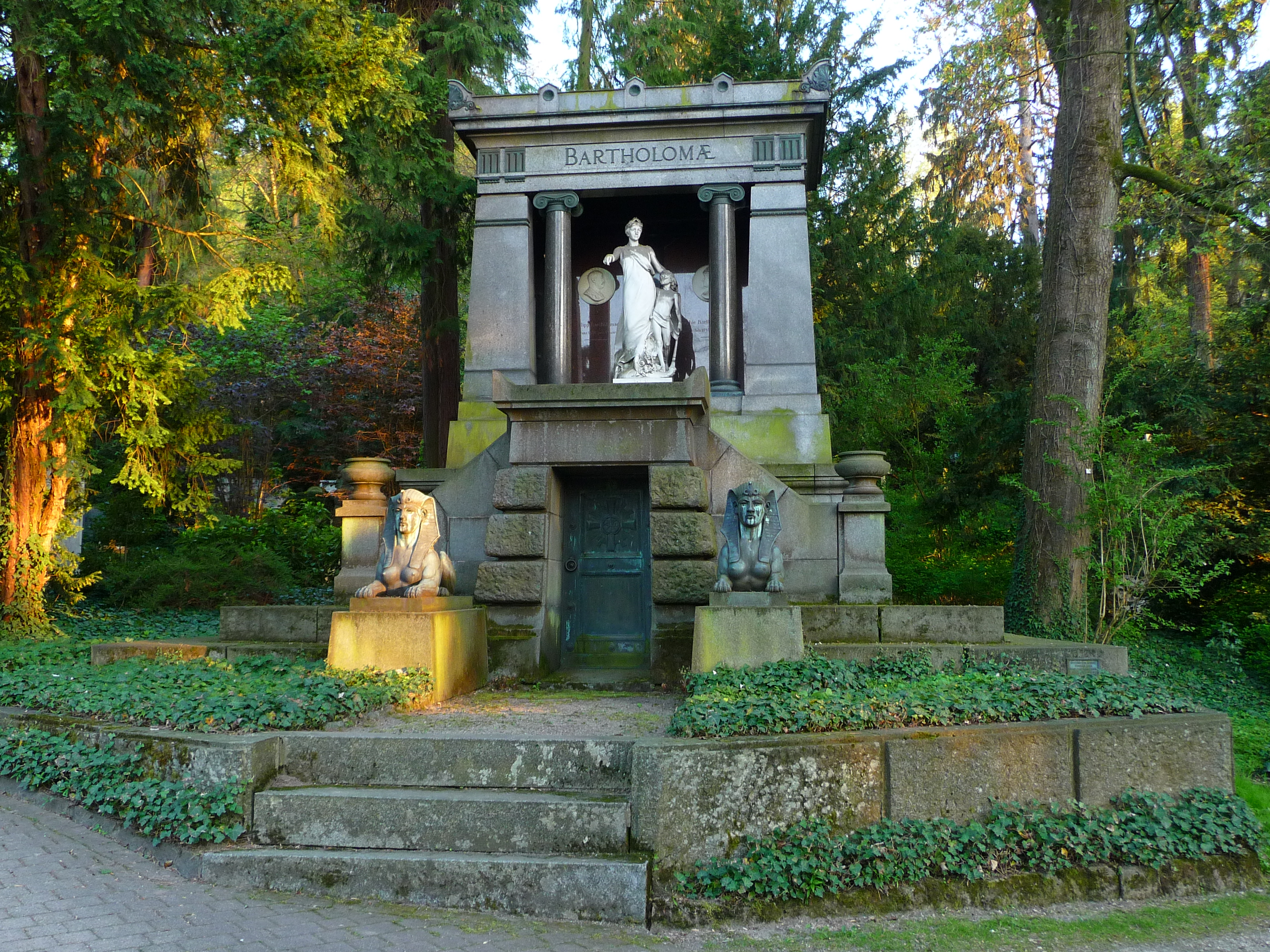 Mausoleum der Familie Bartholomae auf dem Bergfriedhof in Heidelberg (Baden-Württemberg, Deutschland); Entwurf Weinheimer Architekt Otto Hasslinger, Ausführung Granit-Syenitwerke Bensheim und Erzgießerei P. Stotz, Stuttgart